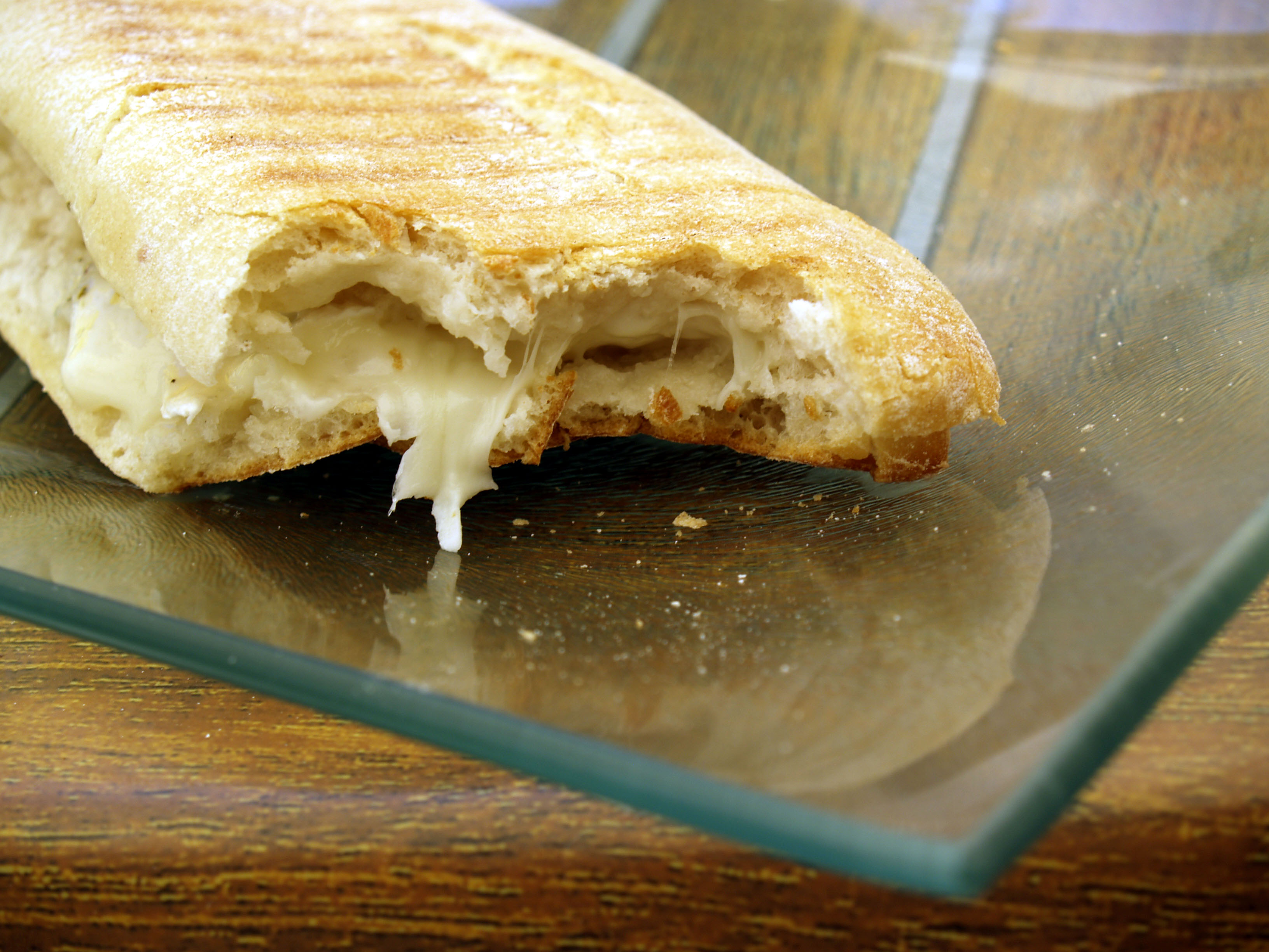 Panini med gedeost, mozzarella og gorgonzola